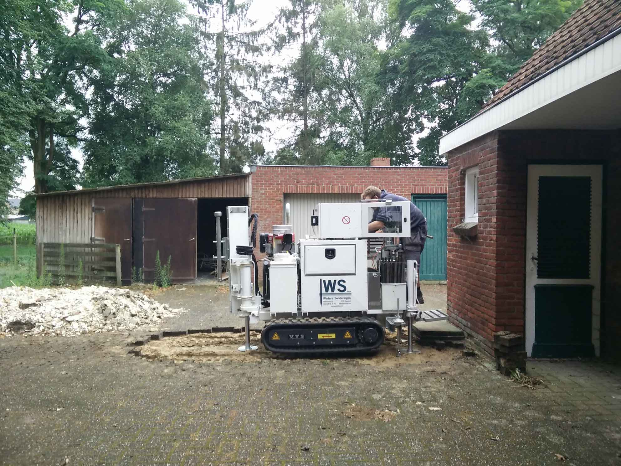 Door de flexibele mini-sondeerrups kan men sonderen op moeilijk bereikbare plaatsen en binnen.